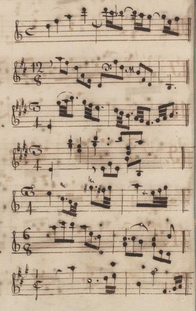 Table du volume III des manuscrits de Venise (incipit des sonates 8 à 14, K. 213 à 219)